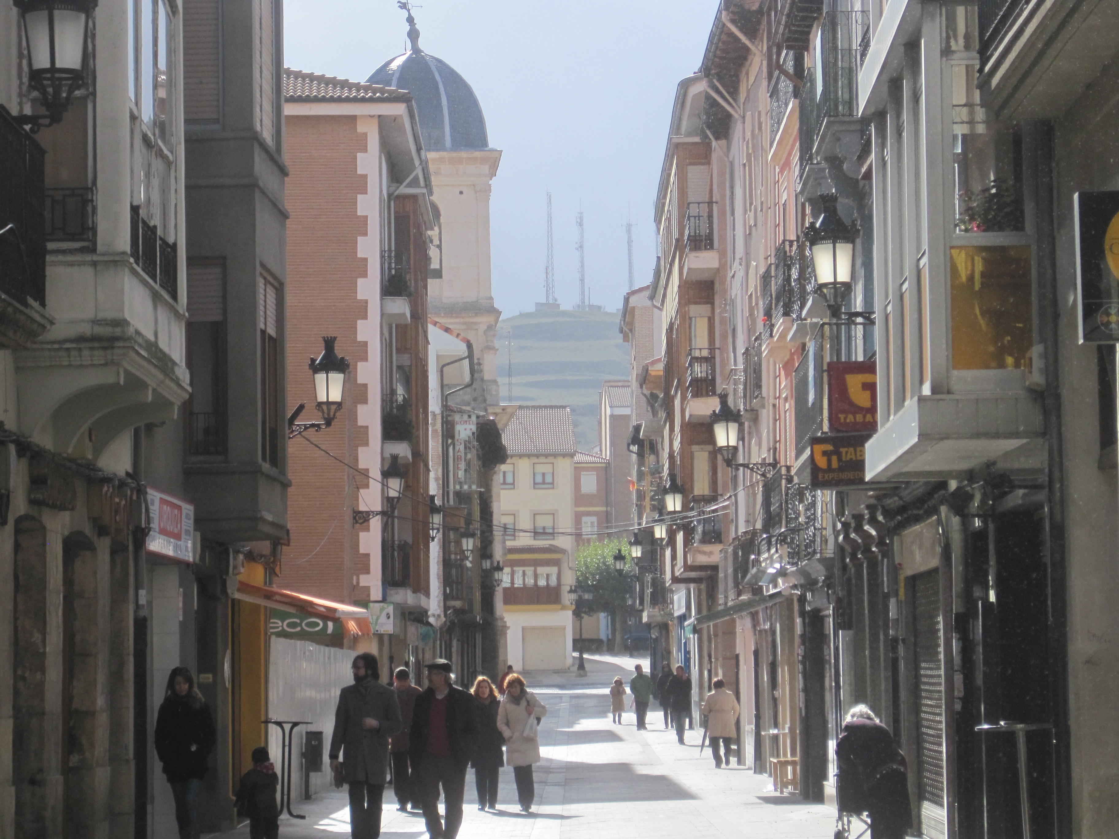 Vista de la Calle Santa María Encimera, la primera de la Ciudad en ser recientemente peatonalizada.